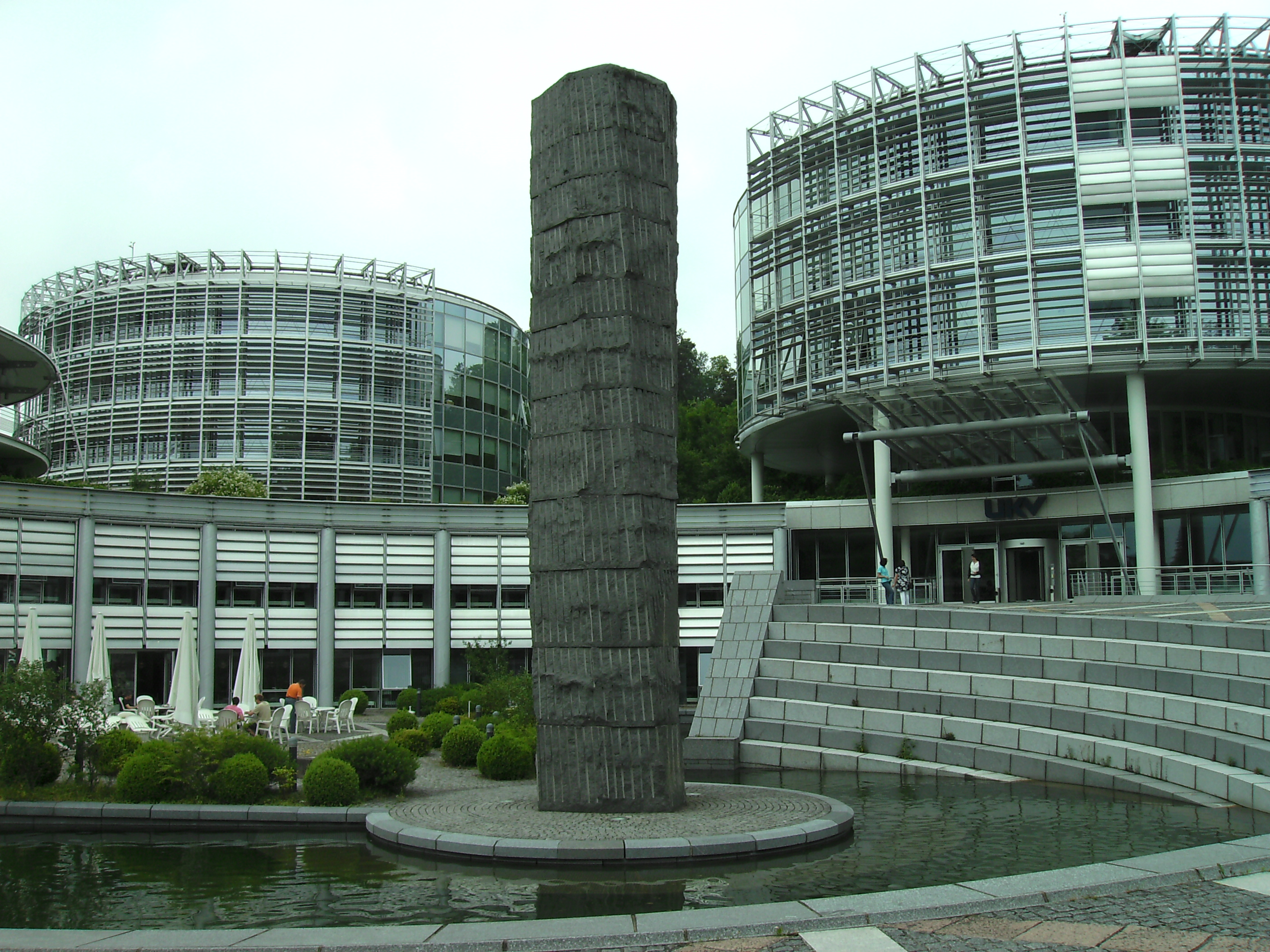 Basaltstele in der Brunnenanlage des UKV-Gebäudes Saarland/Germany